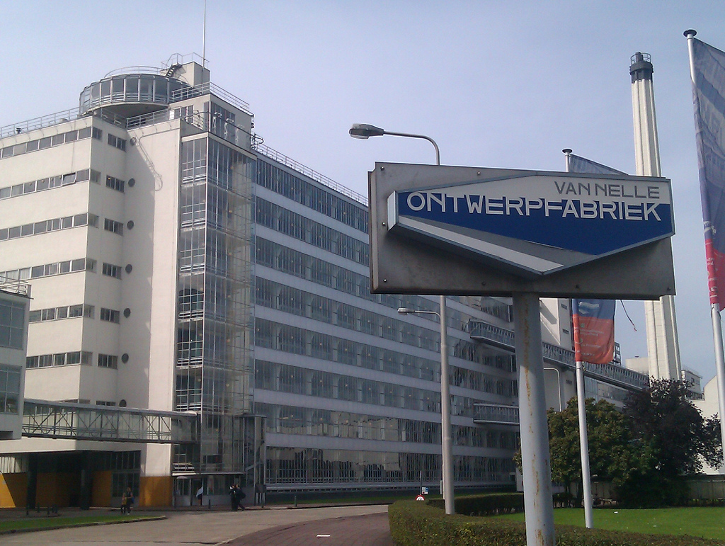 Rotterdam, Open Monumentendag, 10-09-2011